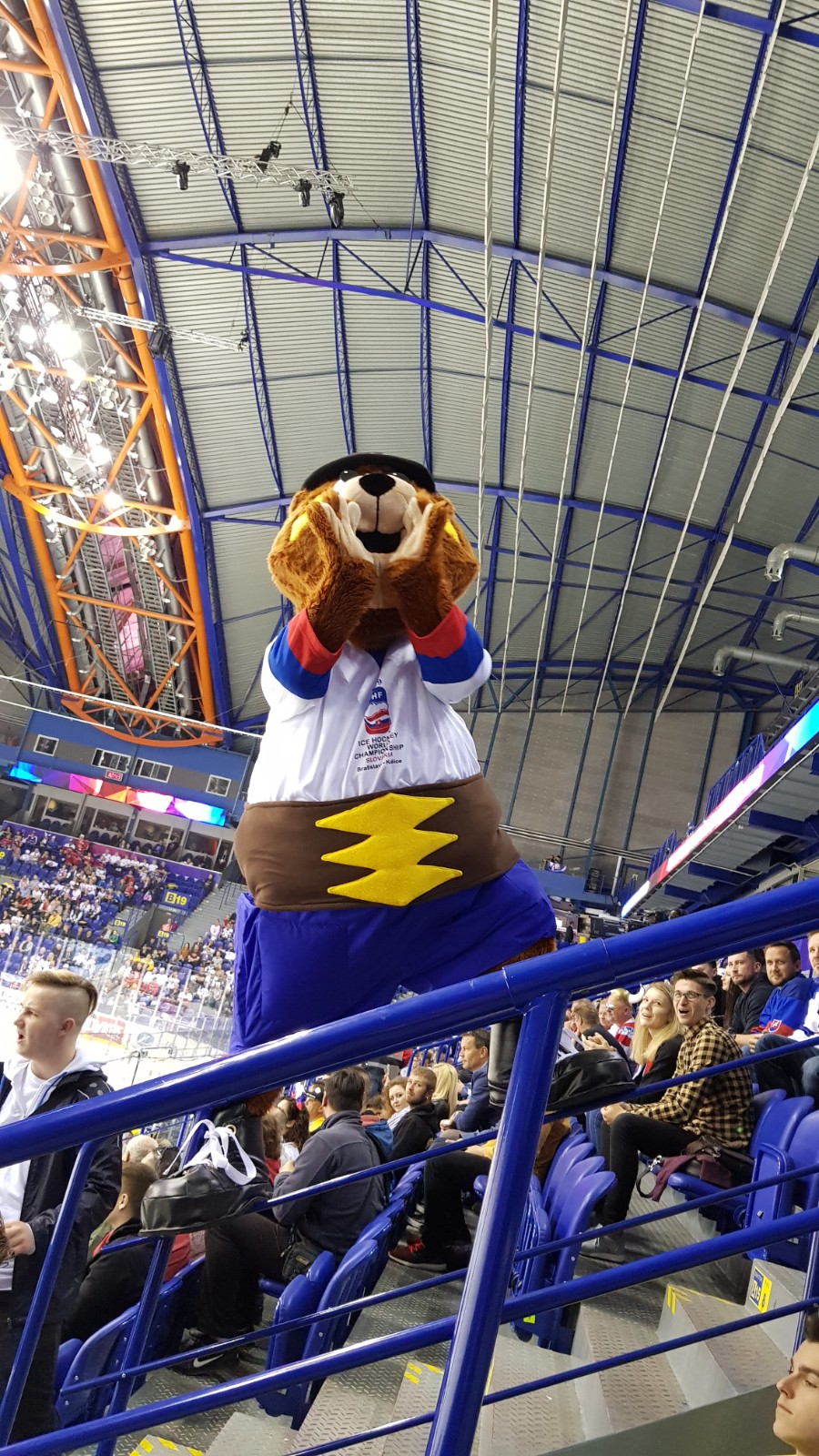 Medveď Macejko, oficiálny maskot hokejových majstrovstiev sveta 2019 na Slovensku.